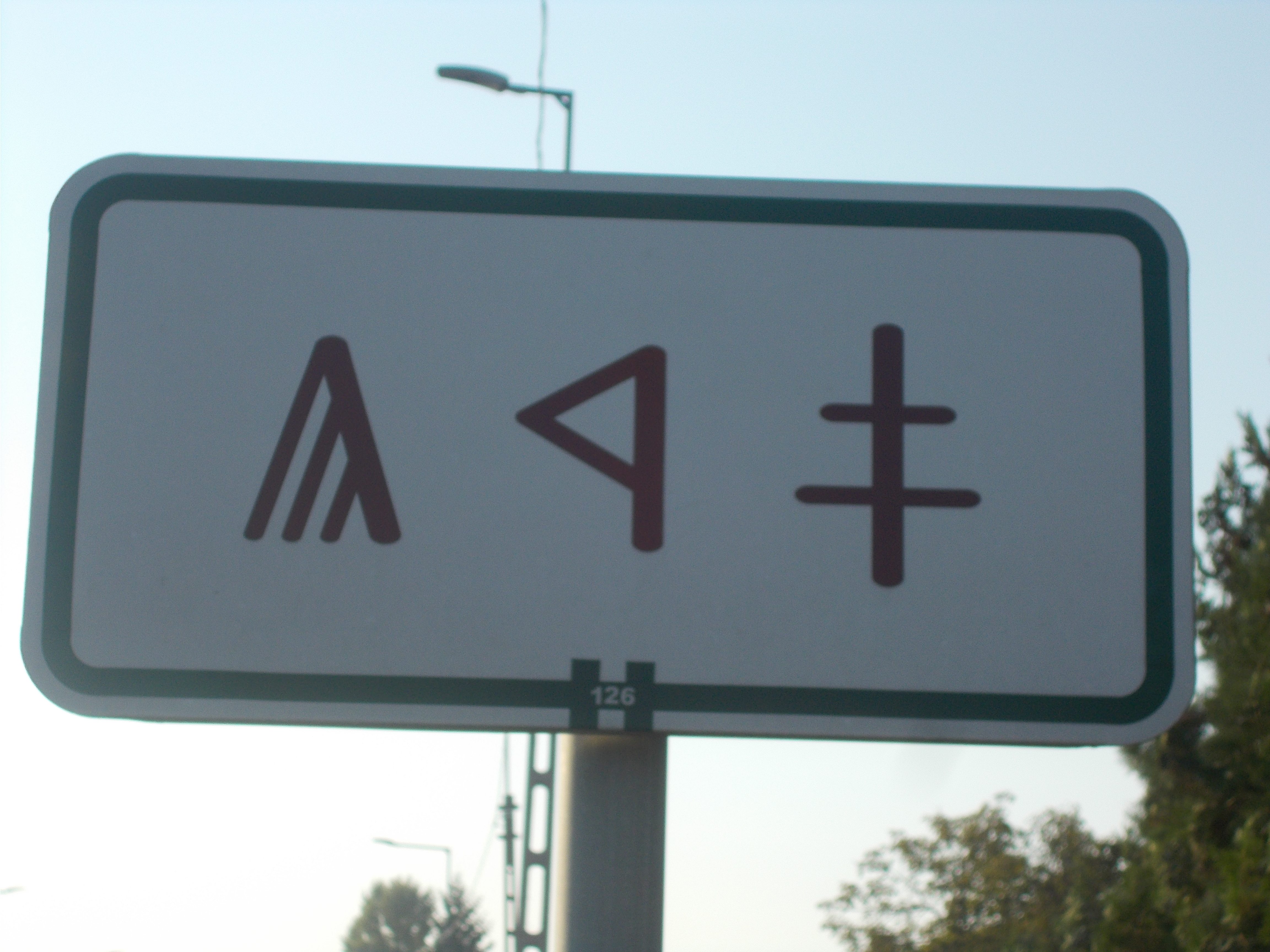 Gyál rovásírásos helységnévtáblája A Kőrösi úton Pestszentimre felől